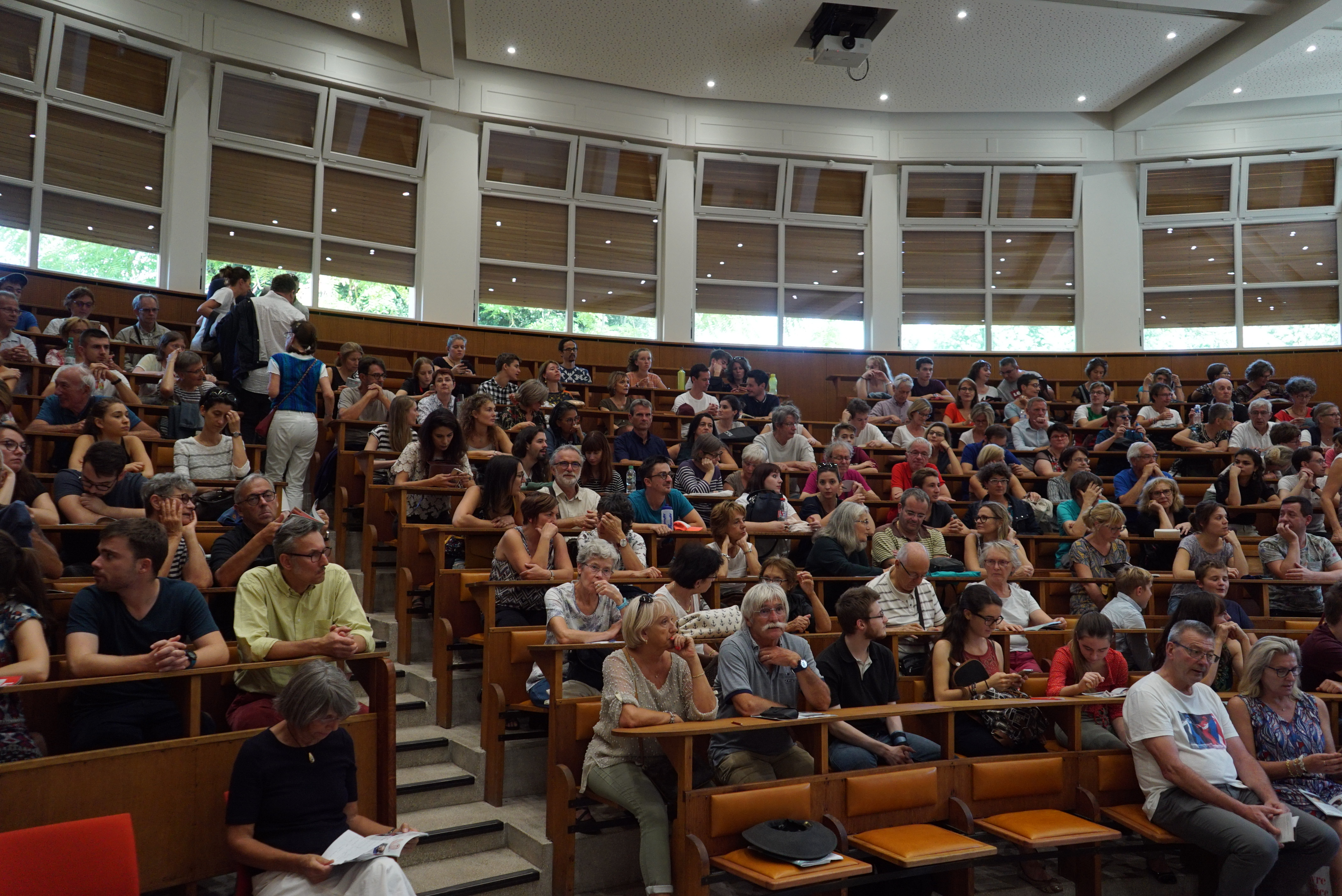 lors de la causerie scientifique "nos identités numériquesː comment le smartphone nous transforme ?" à Nancy.